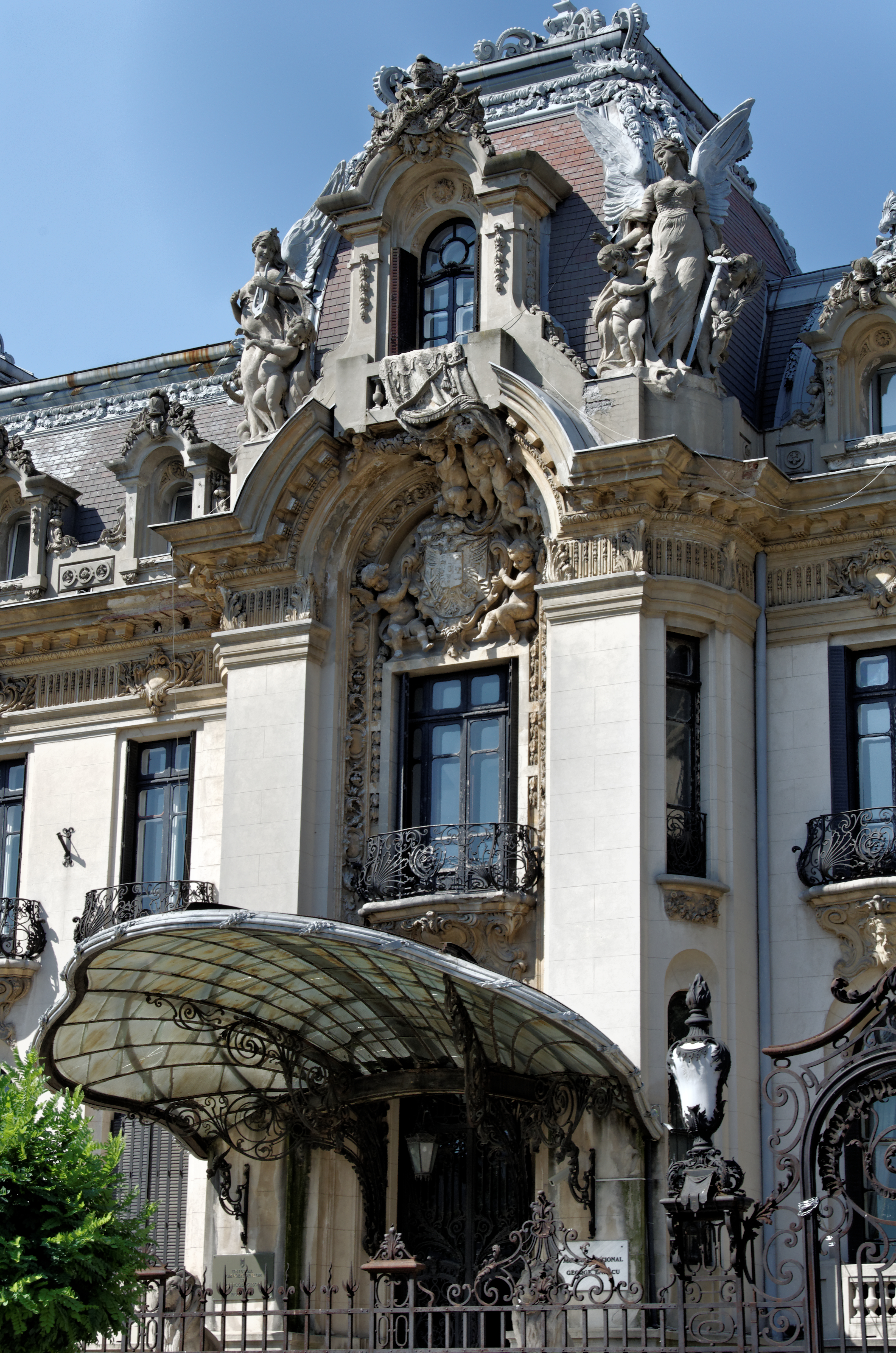 Entrée du palais Cantacusène (1900) abritant le Musée Gheorghe Enescu, Bucarest